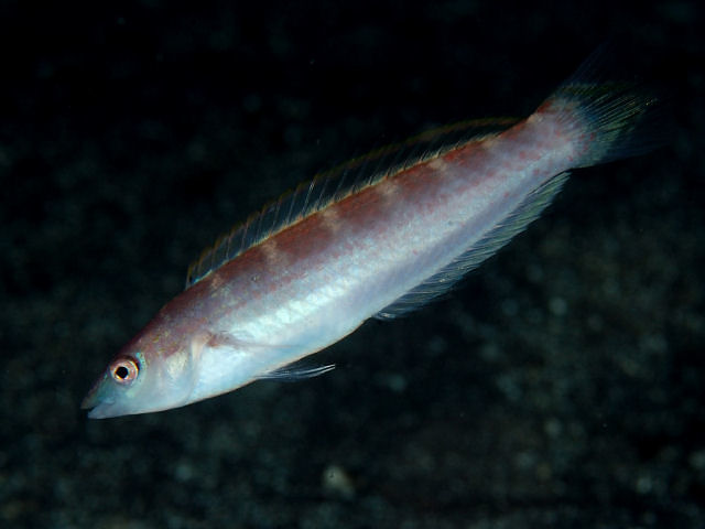 イトベラ Suezichthys gracilis